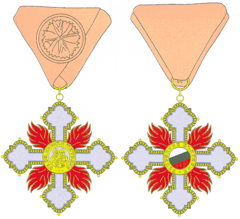 Орден "Стара планина"